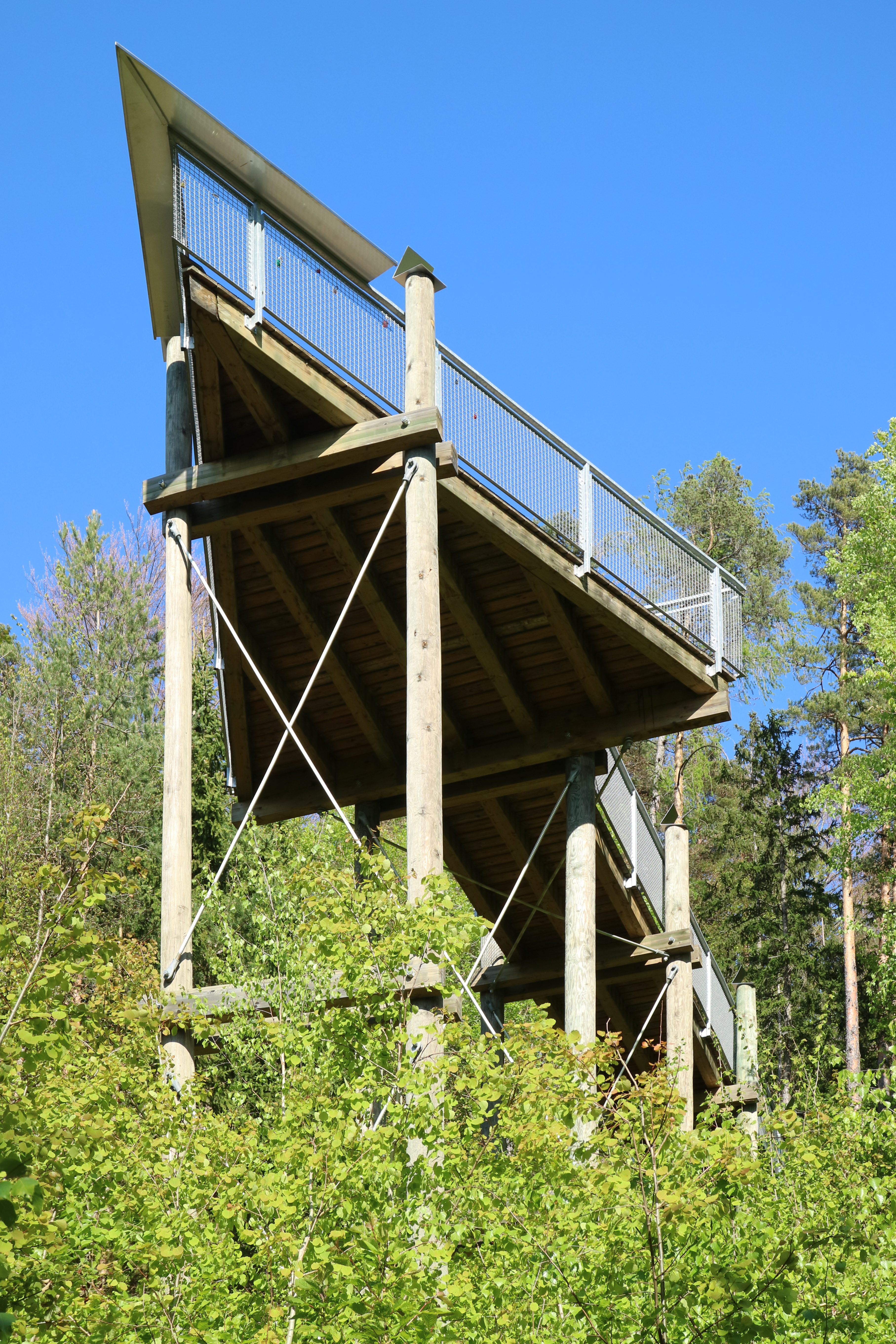 Aussichtsplattform „Westblick“ am Westhang des Buchkogels, Graz-Straßgang